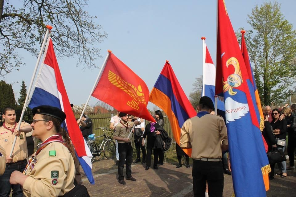 100-jarige herdenking Armeense, Aramese, Griekse genocide, Almelo, Nederland